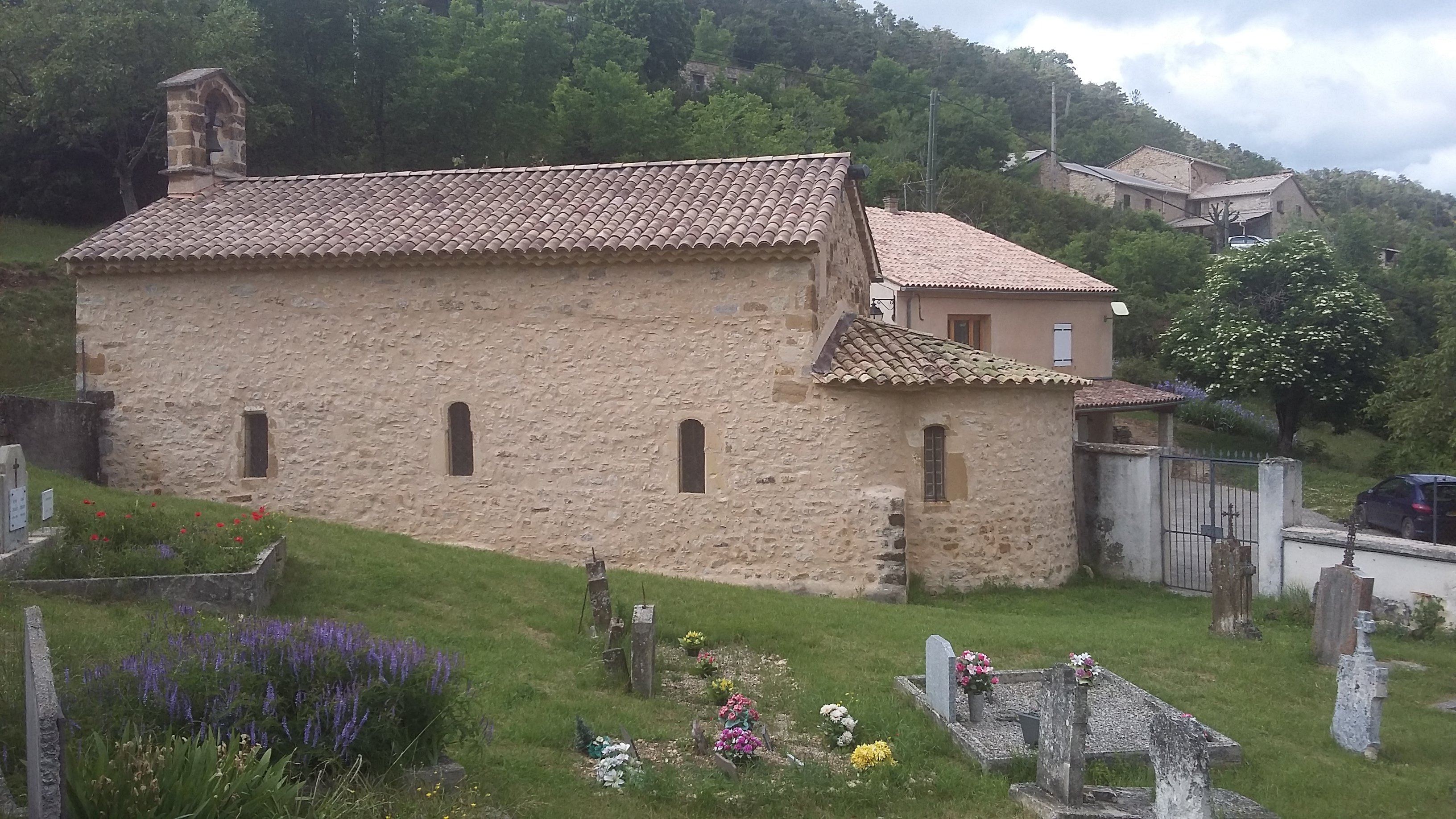 Église de Roussieux en Drôme Provençales au cœur du Parc Naturel Régional des Baronnies Provençales !